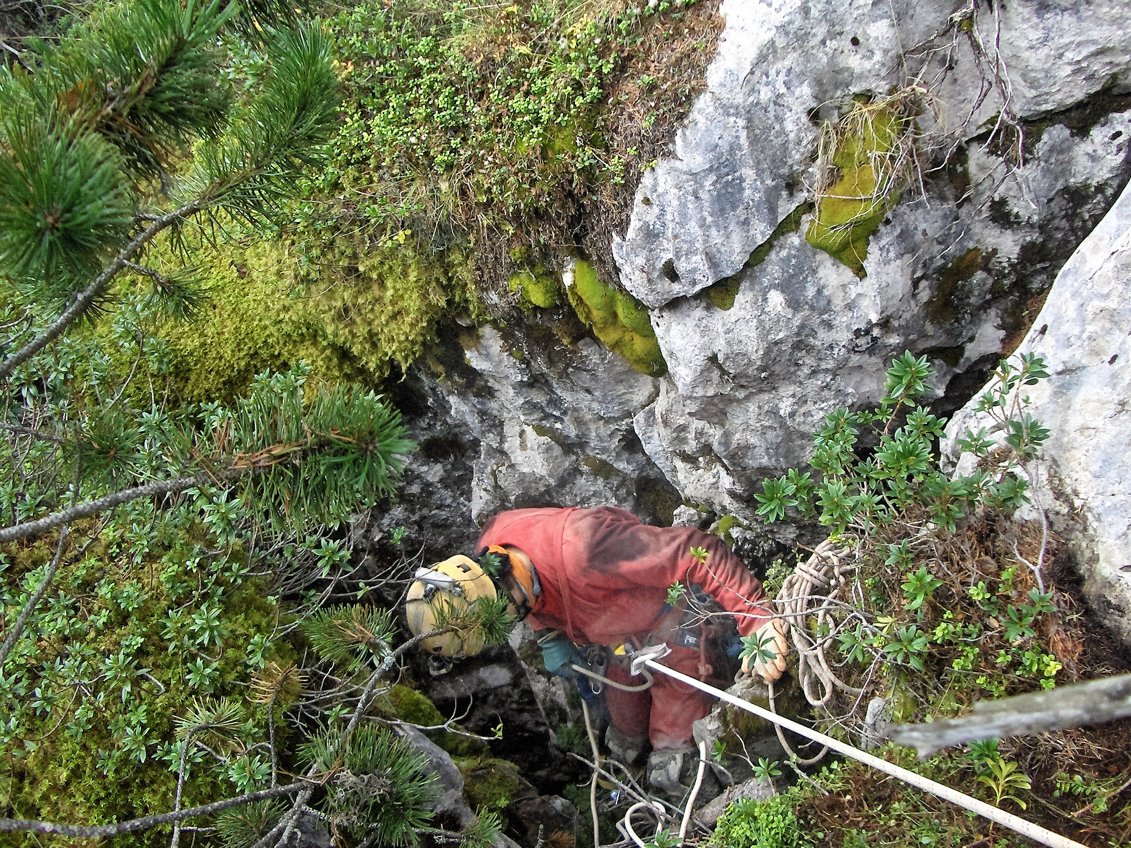 L'entée est la plus basse du réseau et la dernière découverte du réseau du Clot D'aspres